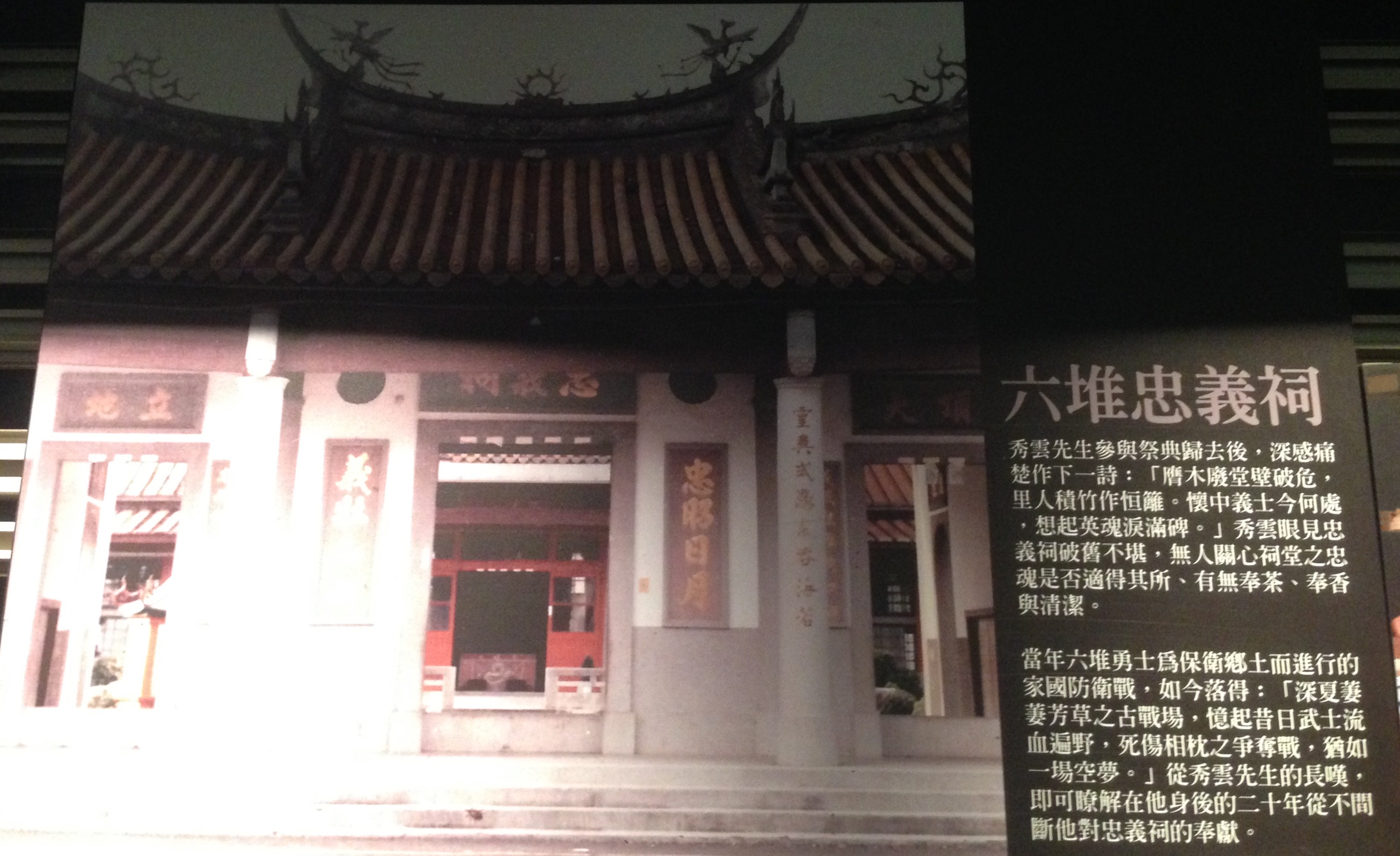 中文（台灣）: 李秀雲先生攝影紀念館一景，上面有李秀雲的詩。